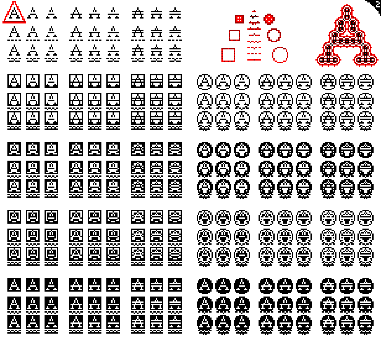 Figure 2. Les styles préprogrammés sont cumulables, voire paramétrables (mais alors guère nombreux dans les années 1980). Les outils de texte actuels (au rendu vectoriel comme bitmap,) conservent cet héritage pratique et simplifié (italique, souligné, gras, et parfois “grisé” en noir et blanc). Les superpositions sont automatiques (activables individuellement dans l'éditeur de fonte). En conservant le même glyphe que dans la figure 1, et en y associant certaines formes prédessinées (cadres, lignes…), les combinaisons itératives semblent polymorphes ; le pixel art, autant procédural qu'économique, s'en trouve aisément démultiplié. Une mise en couleurs reprendrait ces principes.